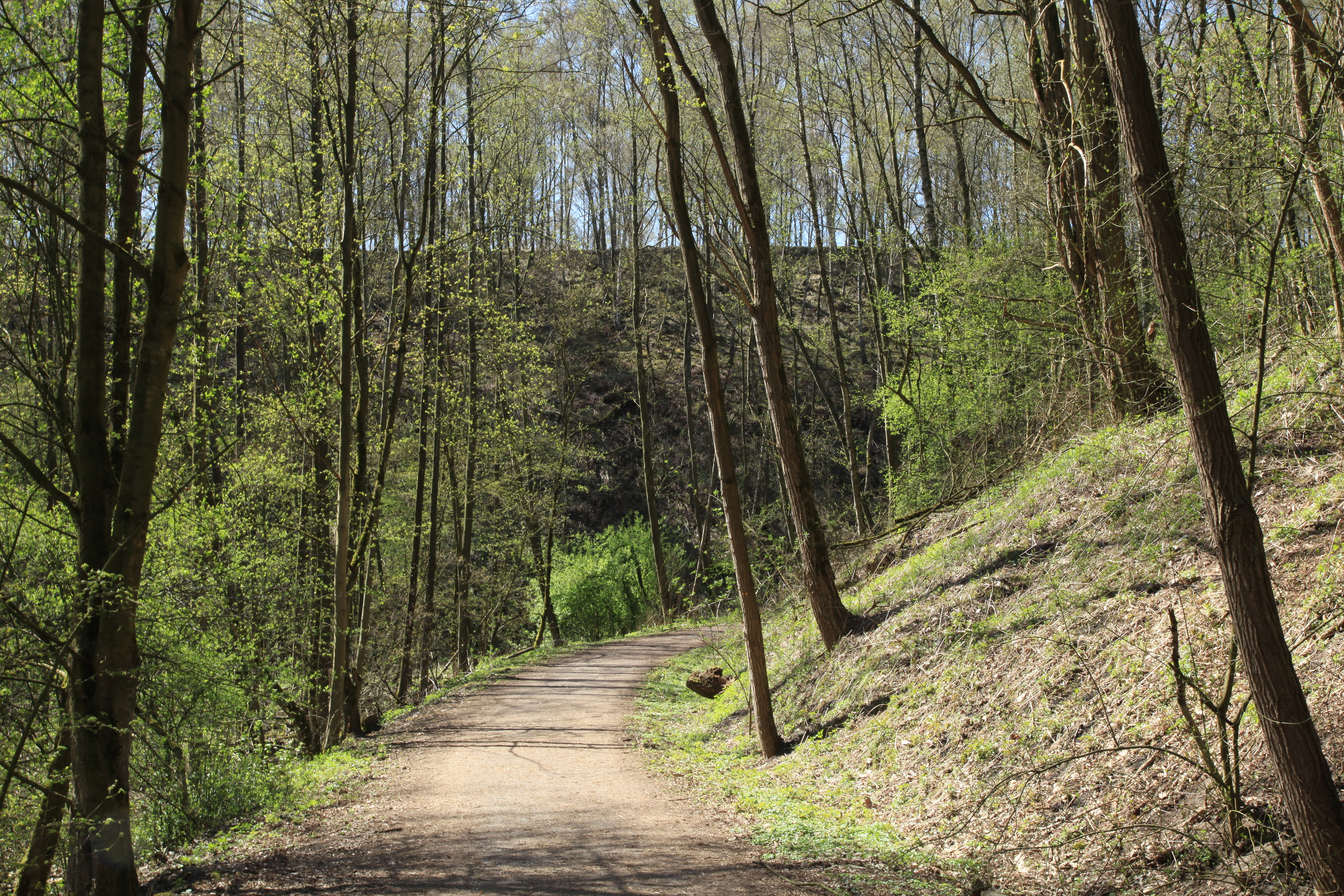 Halde Rheinbaben in Gladbeck an der Industriestraße in Bottrop